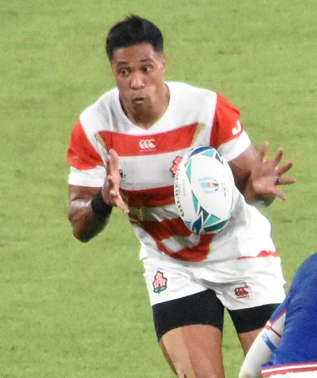 ウィリアム・トゥポウ